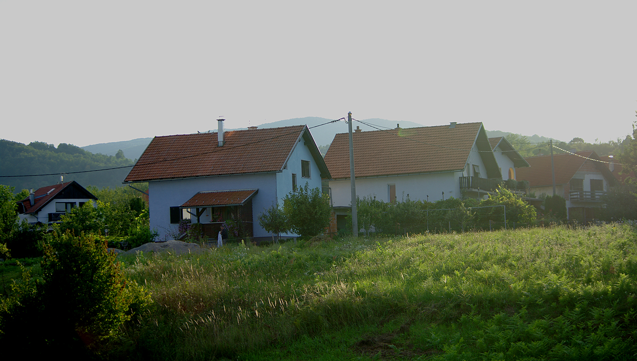 Grabovac, Croatia. Грабовац, Хорватия.